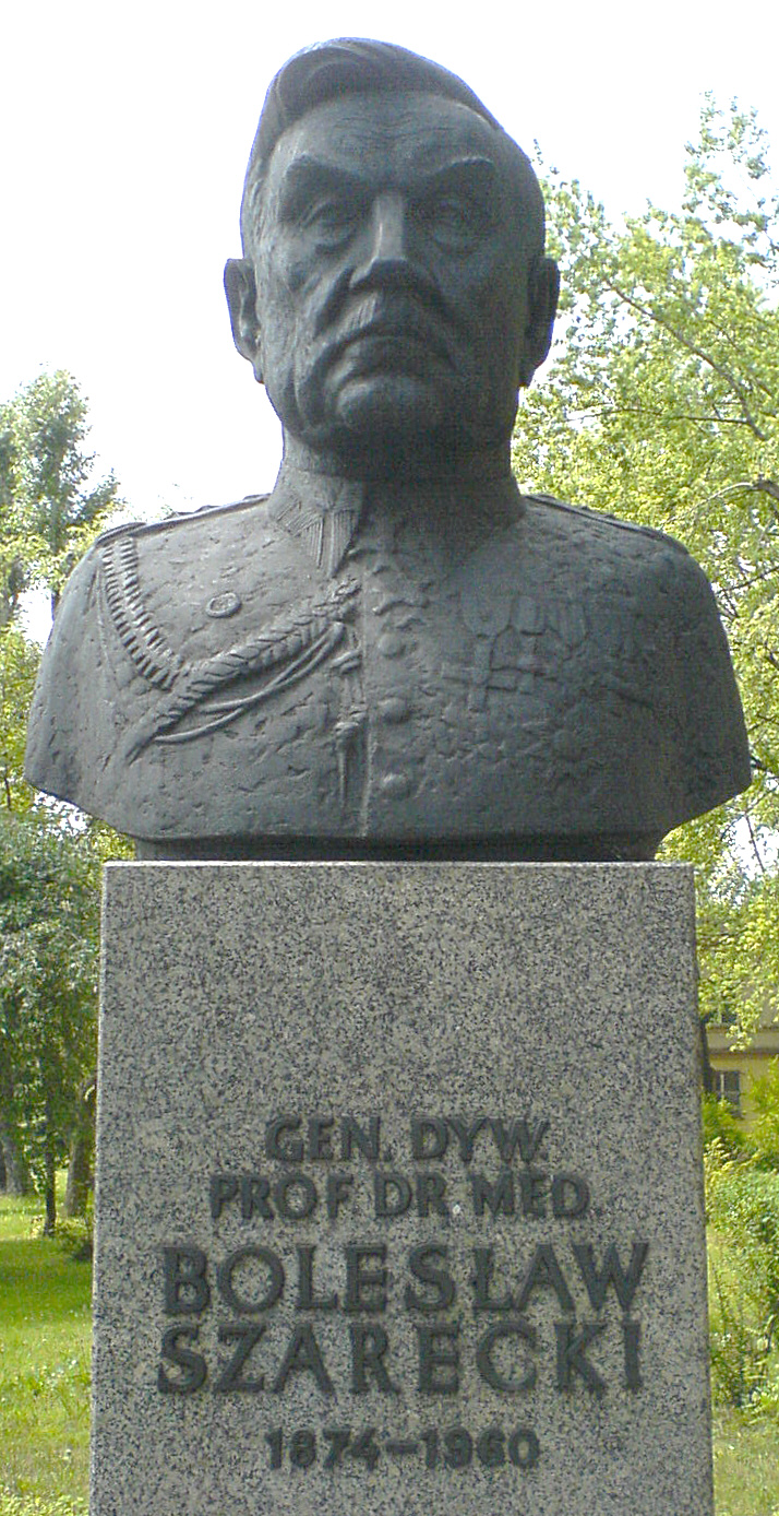 Popiersie gen Szareckiego, pierwotnie na terenie Wojskowej Akademiii Medycznej obecnie na terenie Uniwersytetu Medycznego w Łodzi